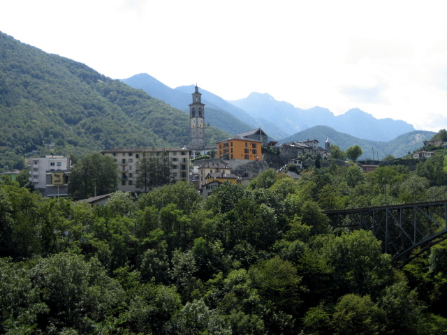 Intragna TI